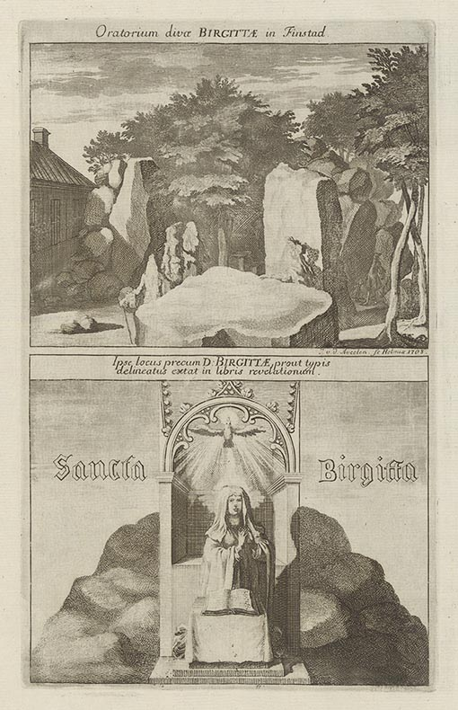 Titel i översättning Heliga Birgittas bönkapell på Finsta. Själva Heliga Birgittas böneställe efter en teckning i böckerna om hennes uppenbarelse